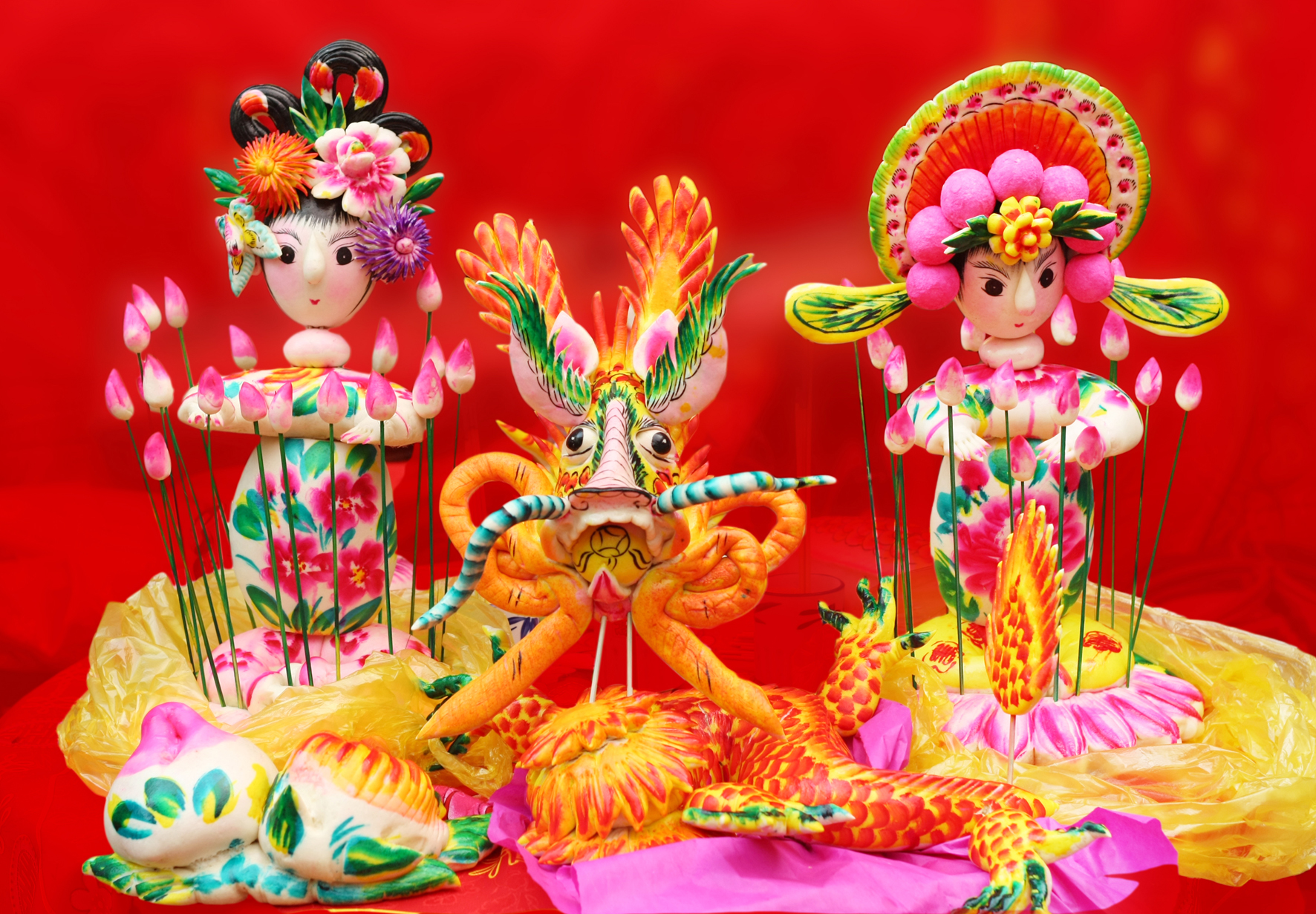 代县花馍-婚礼陪嫁花馍